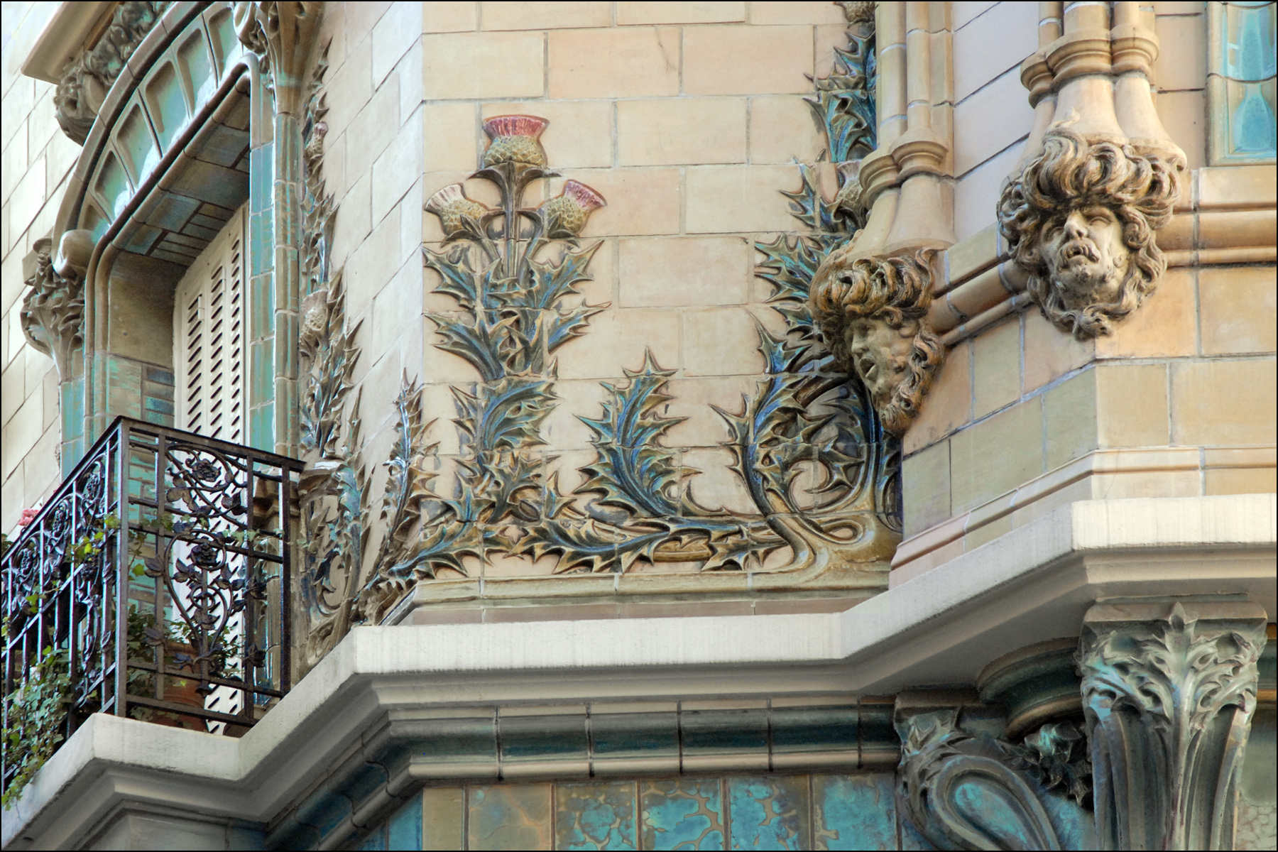 Décor de l'immeuble conçu en 1903, situé au 2 rue Eugène-Manuel à Paris, par l'architecte Charles Klein et le céramiste Emile Muller. L'édifice très coloré en bleu-vert et ocre est du plus beau style art nouveau. Il est recouvert de grès flammé en céramique avec une décoration déclinant les chardons (inspirée du peintre Eugène Grasset) . L'immeuble est inscrit à l'inventaire des Monuments historiques A consulter